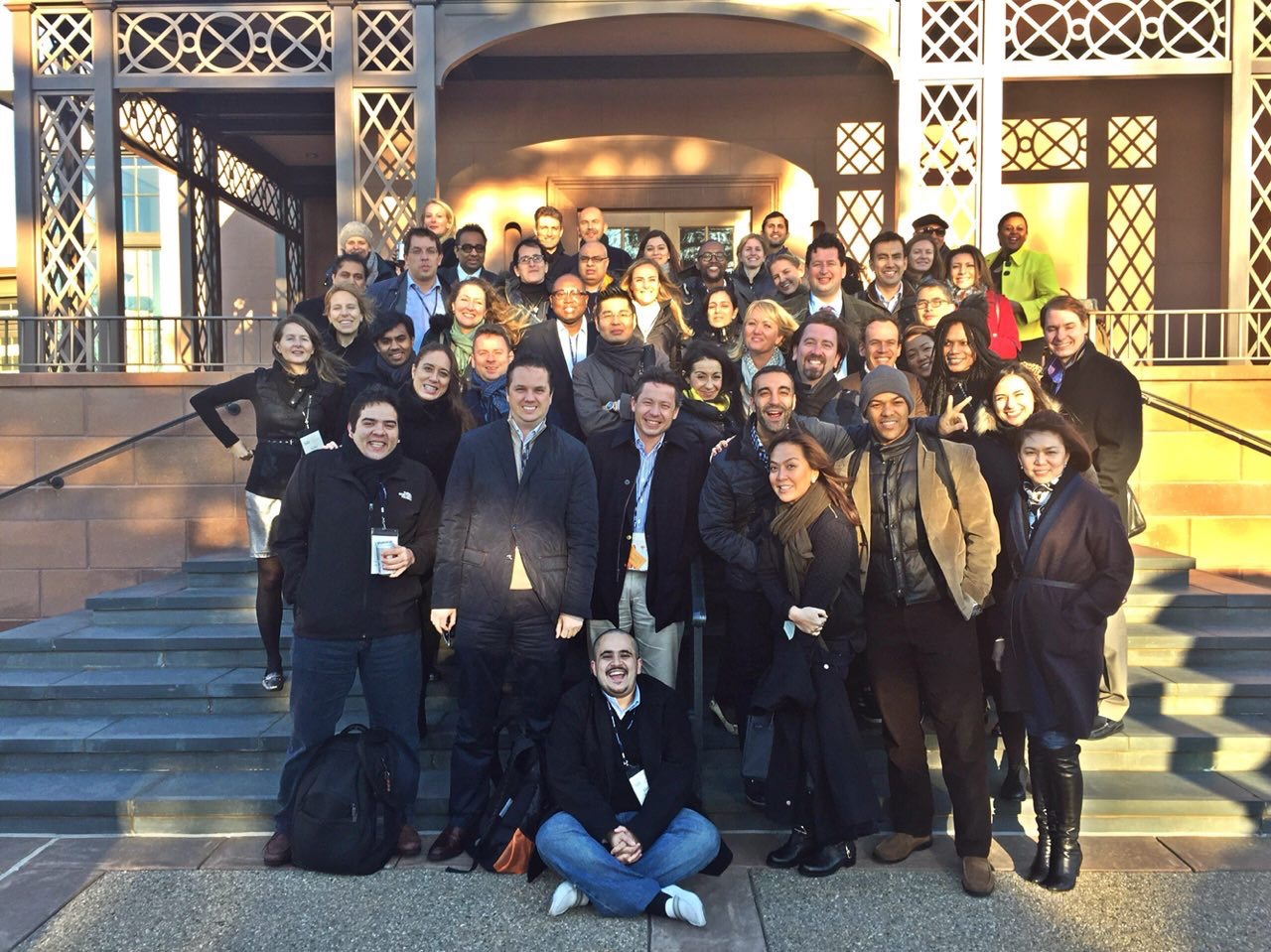 Soulaima Gourani - graduation at Yale University